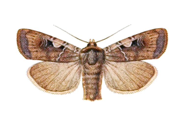 [Agrotis] deraiota Hmpsn. = Xestia c-nigrum deraiota (Hampson, 1902), ♂, Ceylon.